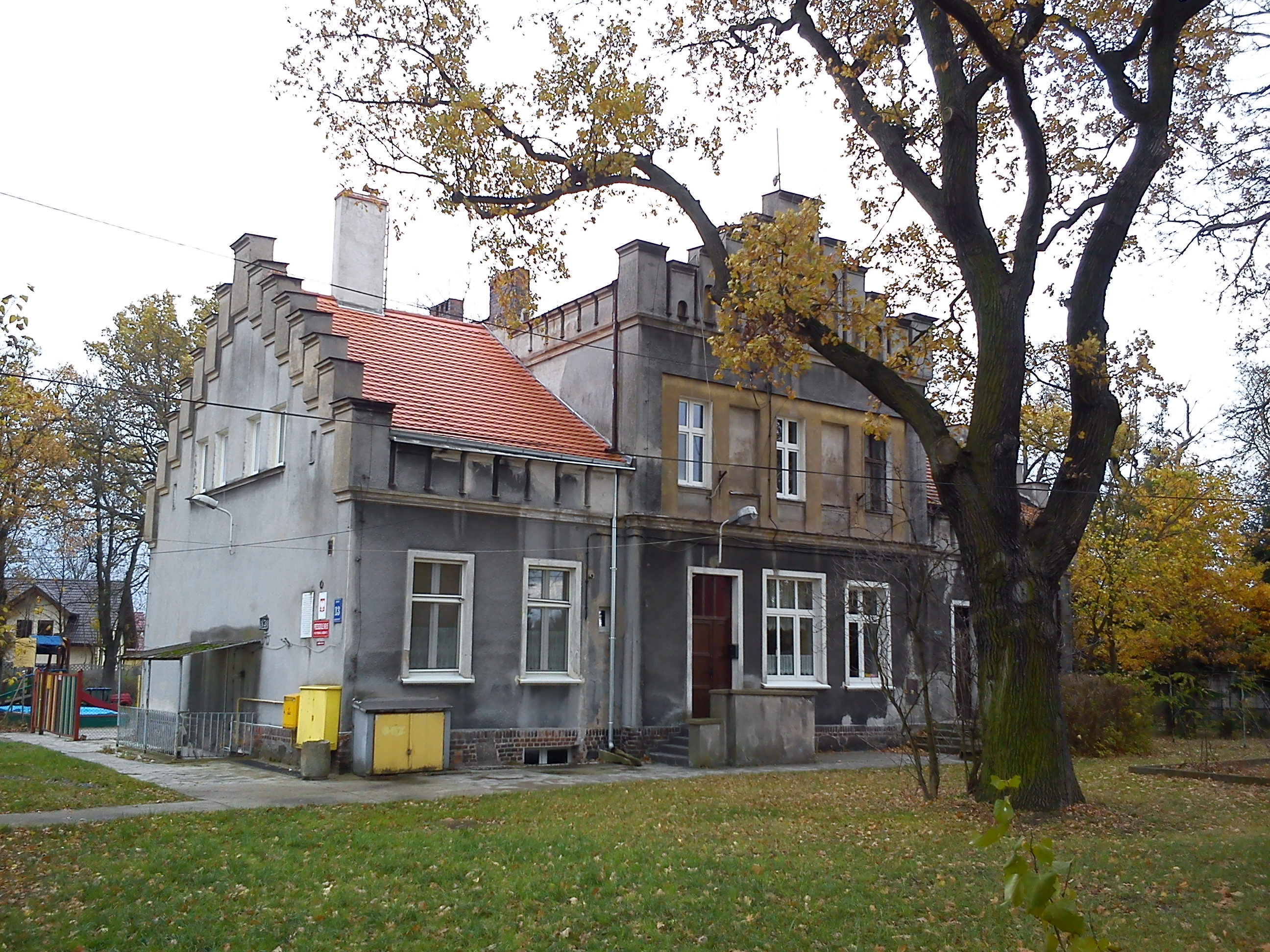 Poznań, ul. Krzesiny 13 - dwór na Krzesinach, obecnie przedszkole.